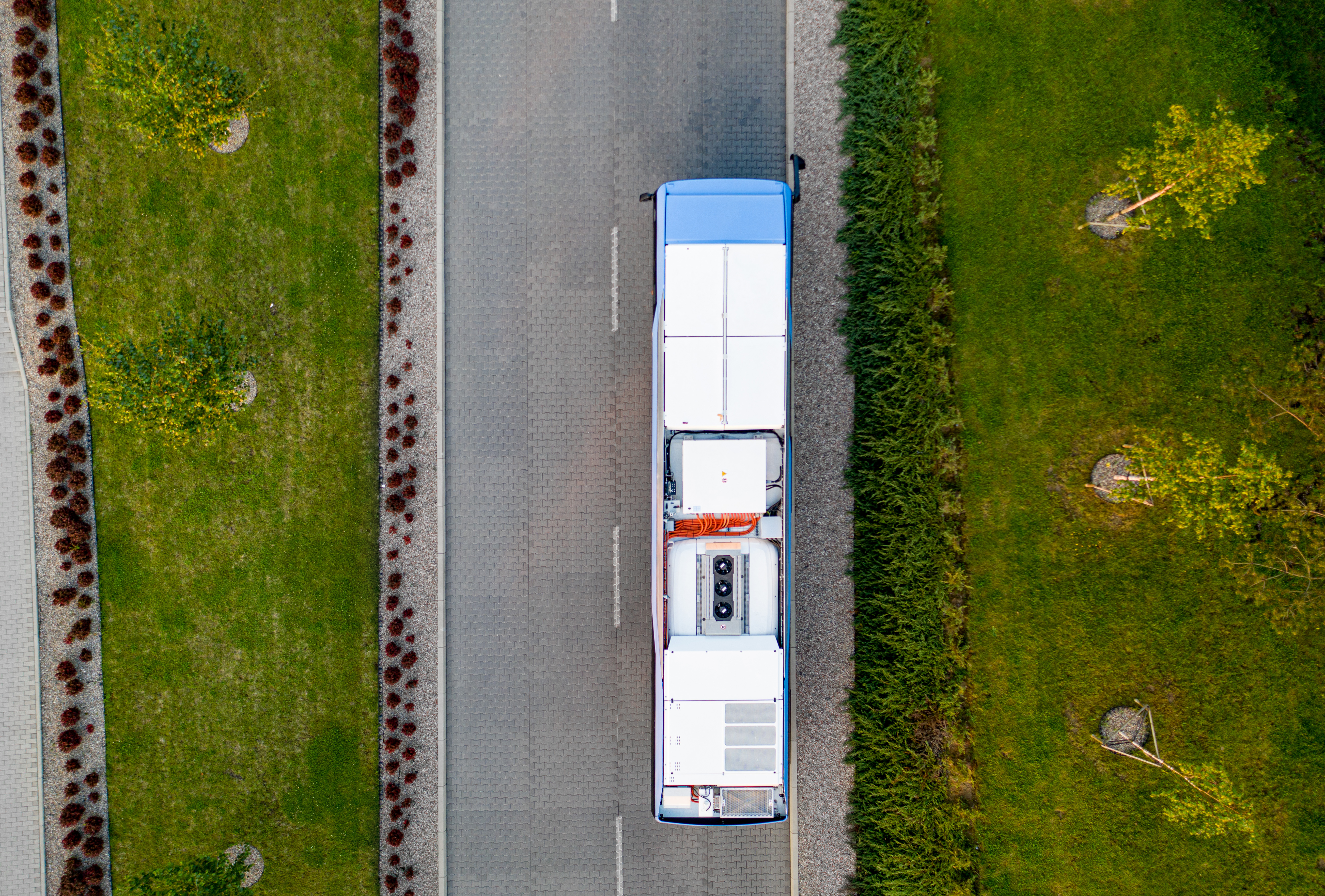 Solaris Urbino 12 hydrogen